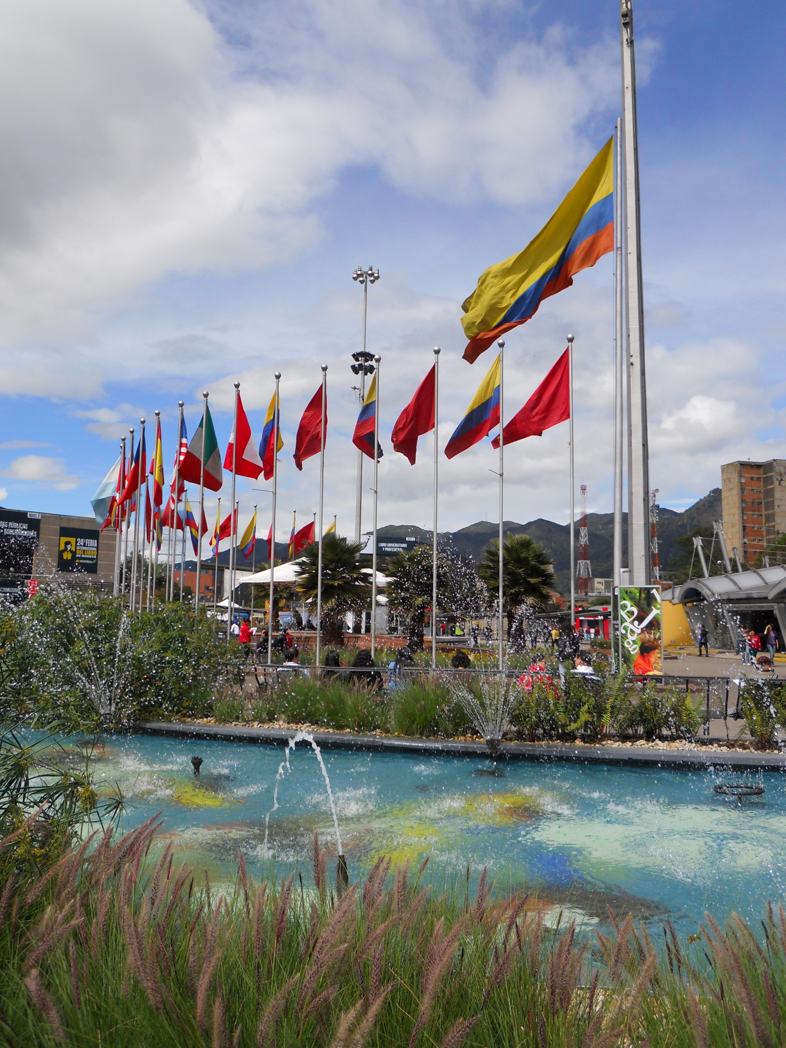 Fuente y banderas en la feria internacional de Corferias, Bogotá.